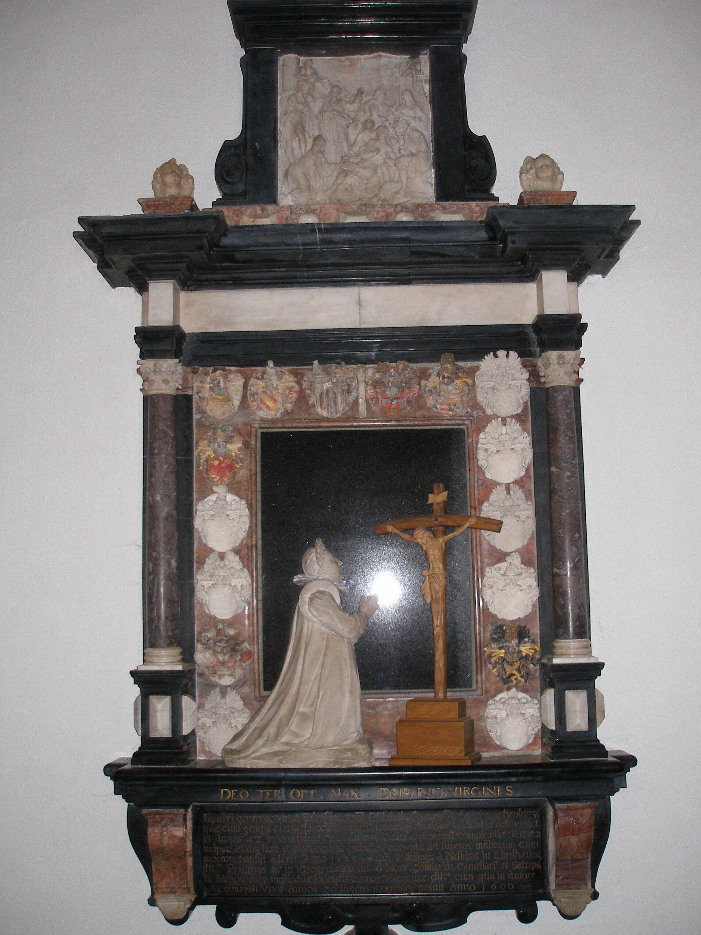 Kloster Bödingen